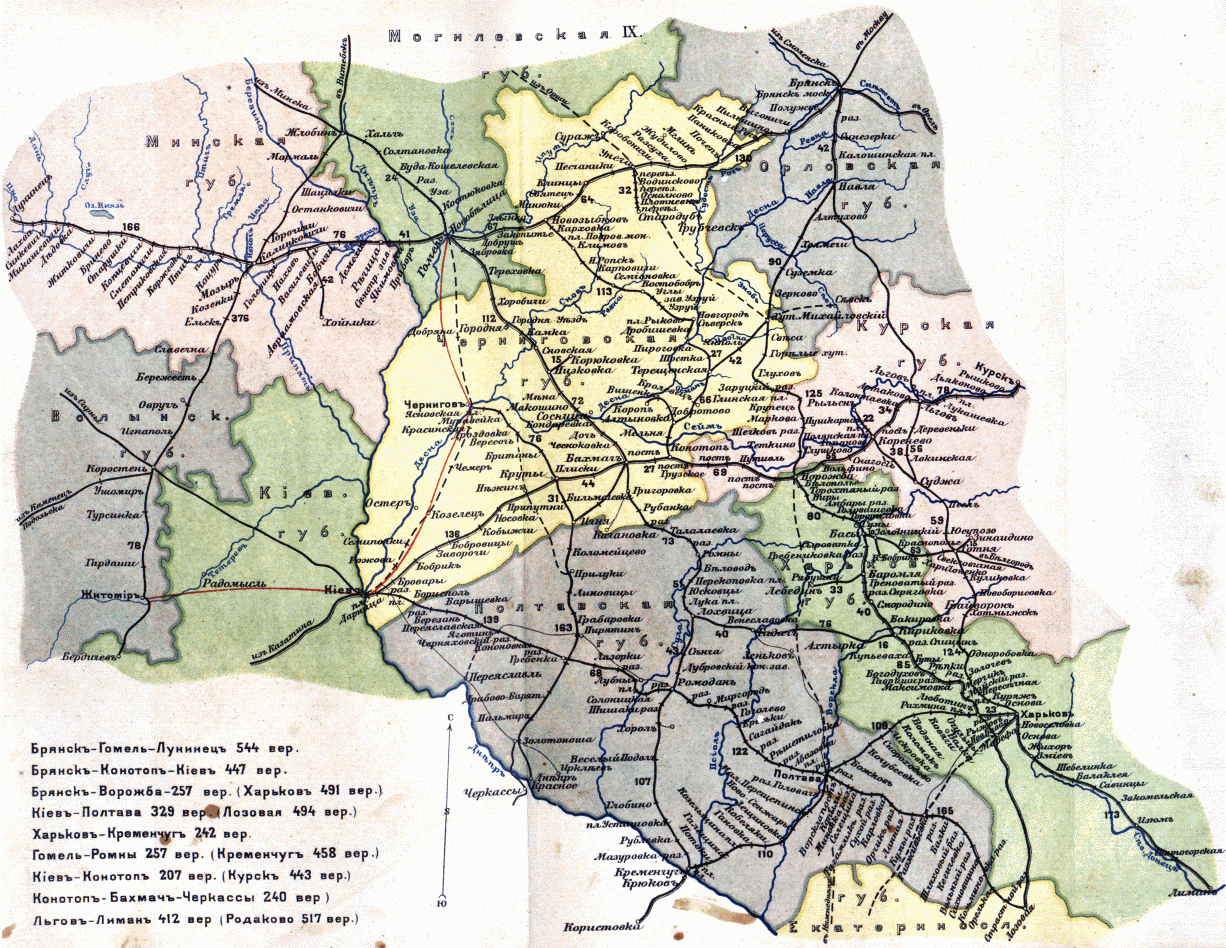 Юго-Западная, Московско-Киево-Воронежская, Полесская, Северо-Донецкая, Южная ж/д.